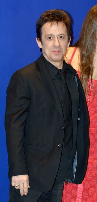 Éric Serra à la cérémonie des César